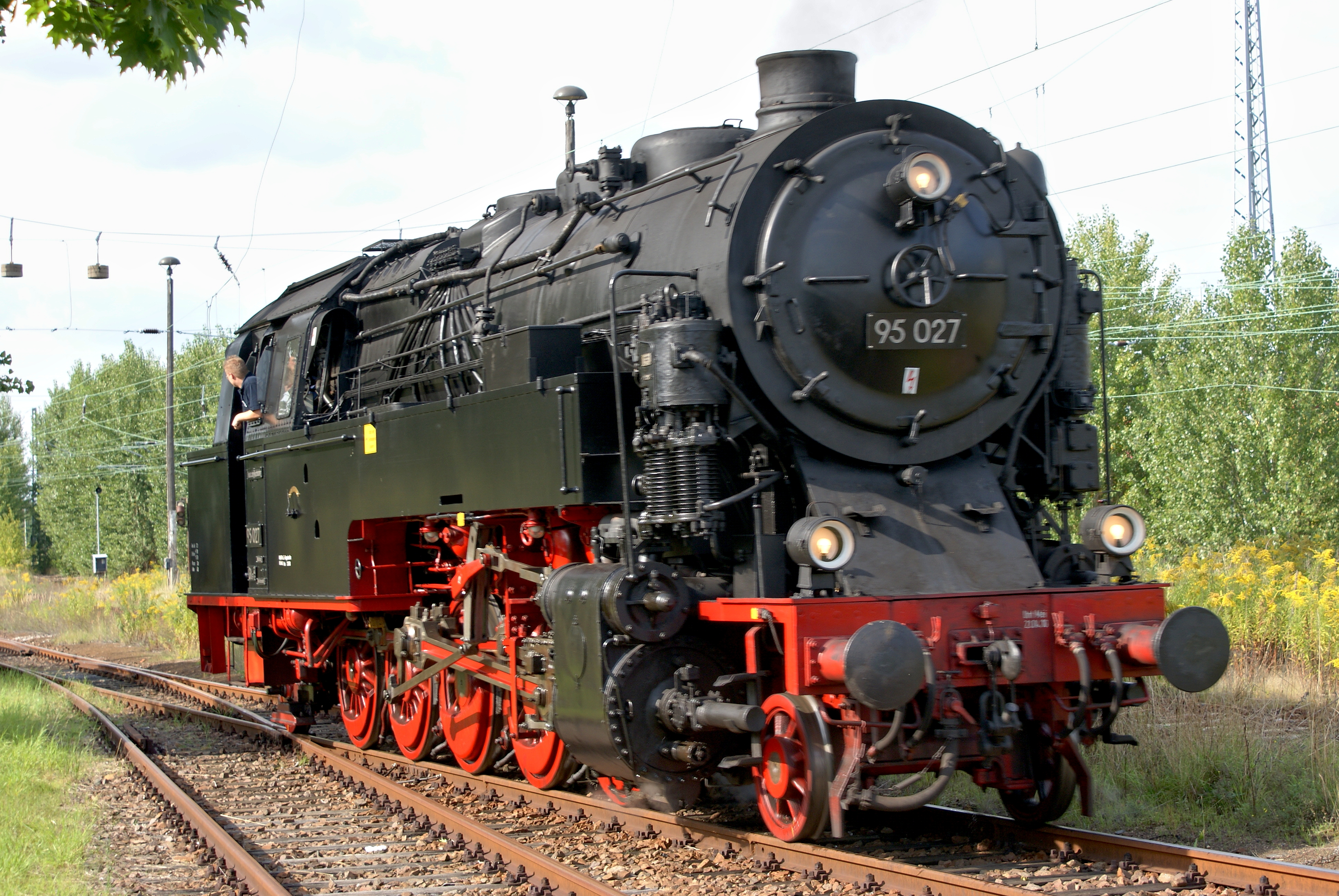 Dampflokomotive 95 027 (ex pr. T 20) Bw Berlin-Schöneweide am 12. September 2010